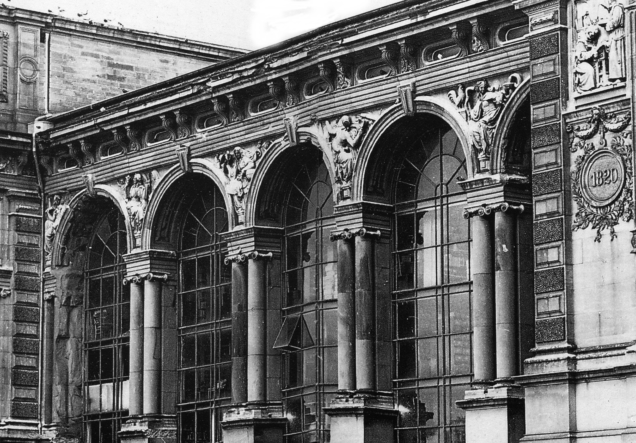 NN: Bogenzwickelreliefs am rechten Flügel der Alten Landesbibliothek in Stuttgart, Entstehungsjahr 1885-1888. Im Zweiten Weltkrieg zerstört. Allegorische Darstellungen der Naturwissenschaften. Halbzwickel links: die Naturkräfte bezwingende Geisteskraft, Vollzwickel von links nach rechts: Forschung, Erdkunde, Himmelskunde, Heilkunde, Halbzwickel rechts (nicht abgebildet): Wohlfahrt, die aus dem Betrieb der Naturwissenschaften entspringt.